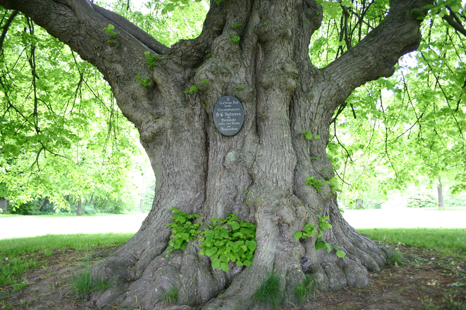 Her fandt eventyrdigteren H.C. Andersen skygge og inspiration til sine eventyr, når han var gæst hos hertugparret i Augustenborg.